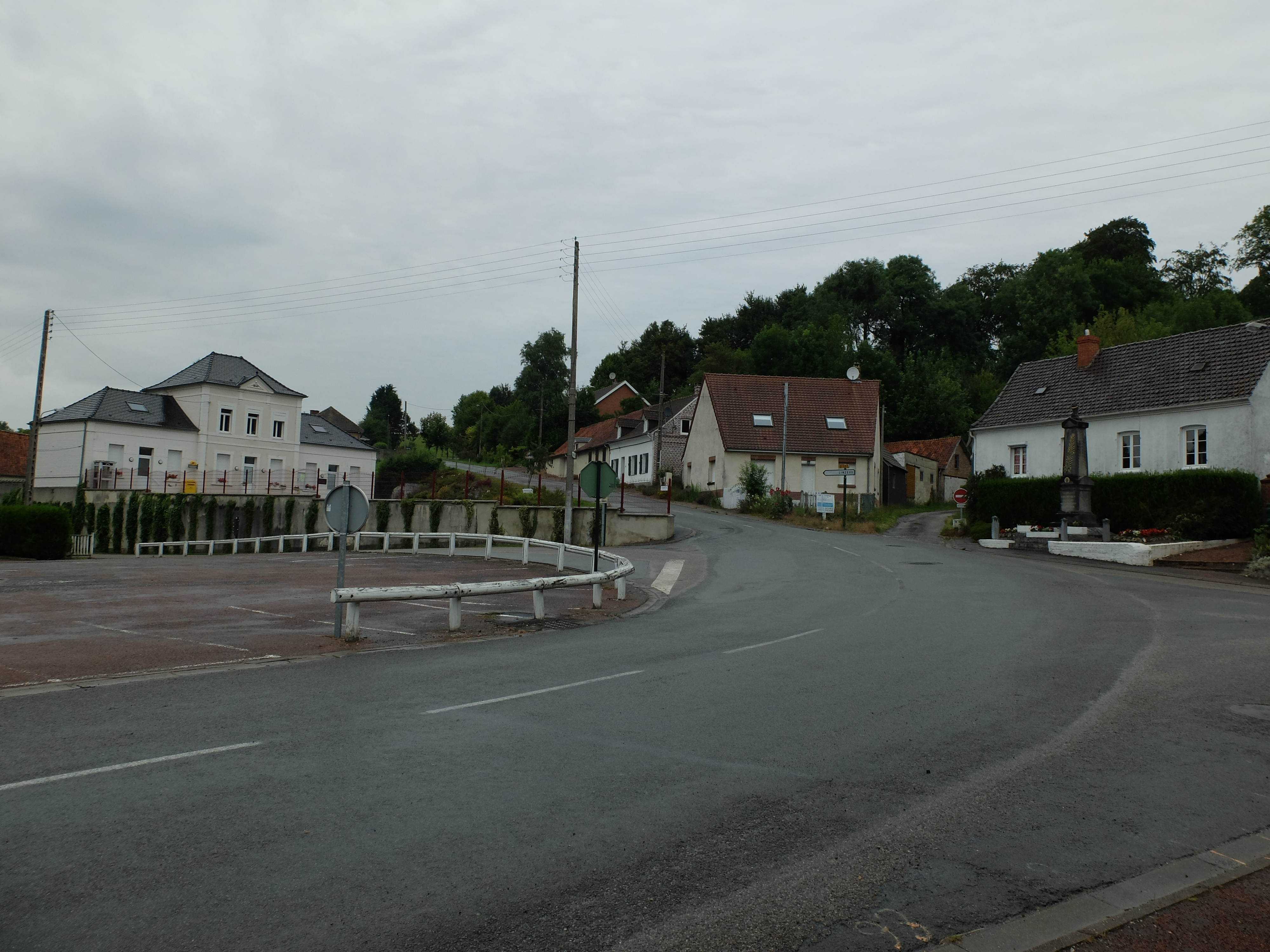 Vue de la place du commandant Louis Helle de Fillièvres. Sont visibles la mairie et le monument aux morts.